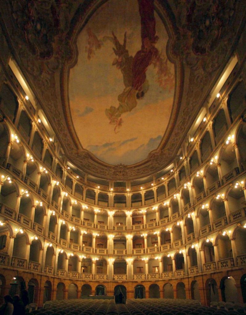 Teatro Fraschini This is a photo of a monument which is part of cultural heritage of Italy.